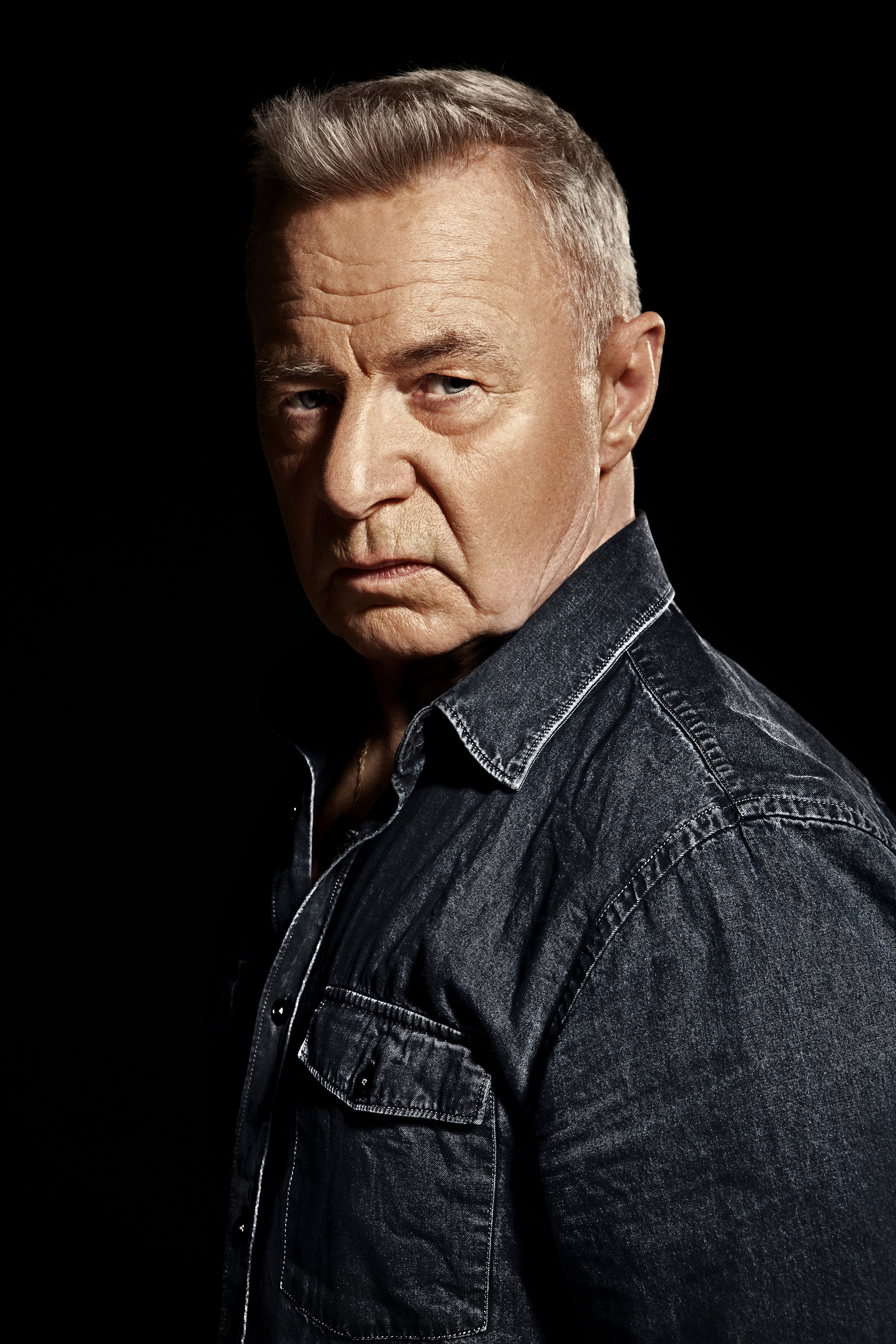 Artisten Jerry Williams.